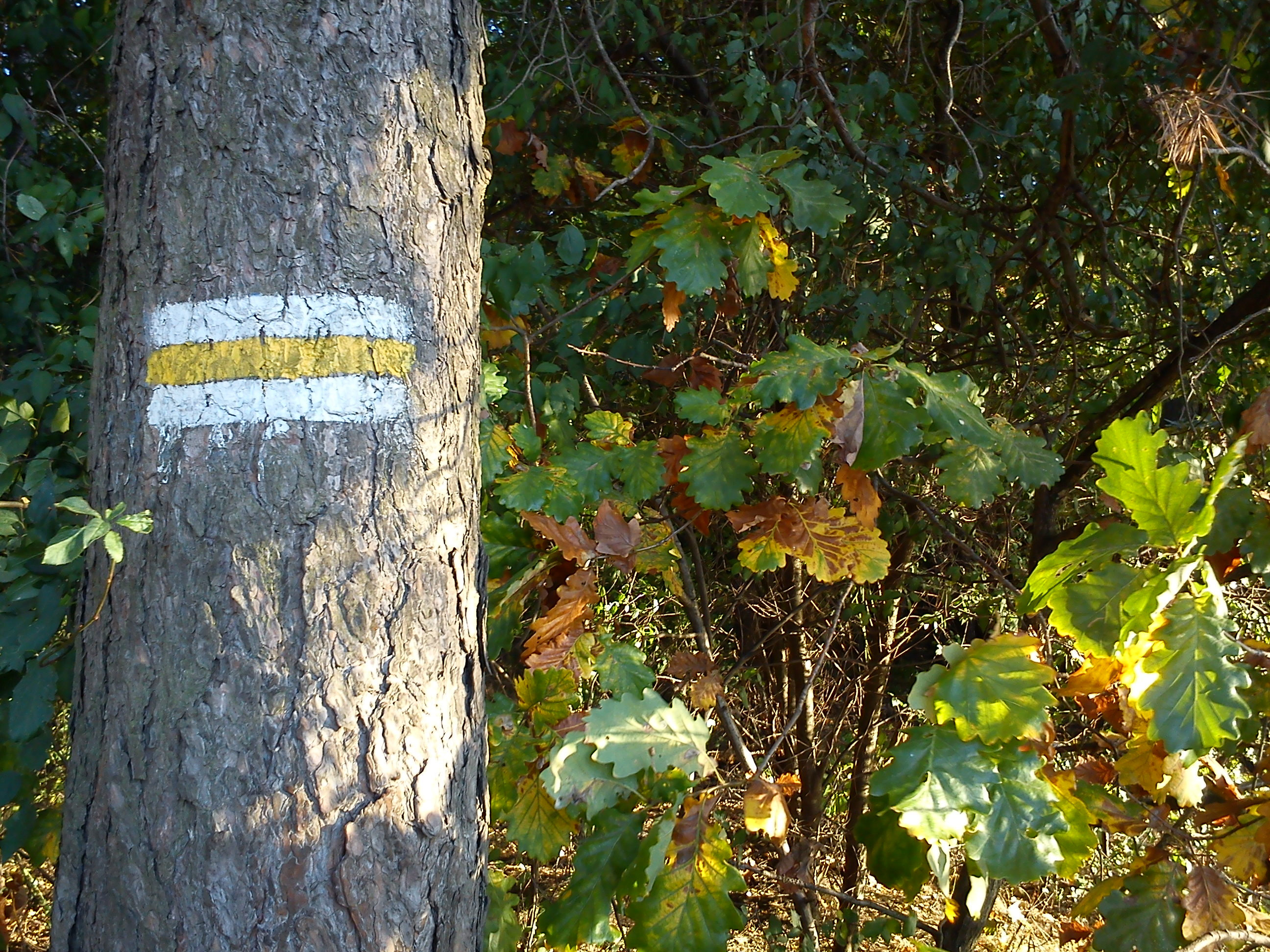 Yellow trail, Poznań, Umultowska street.